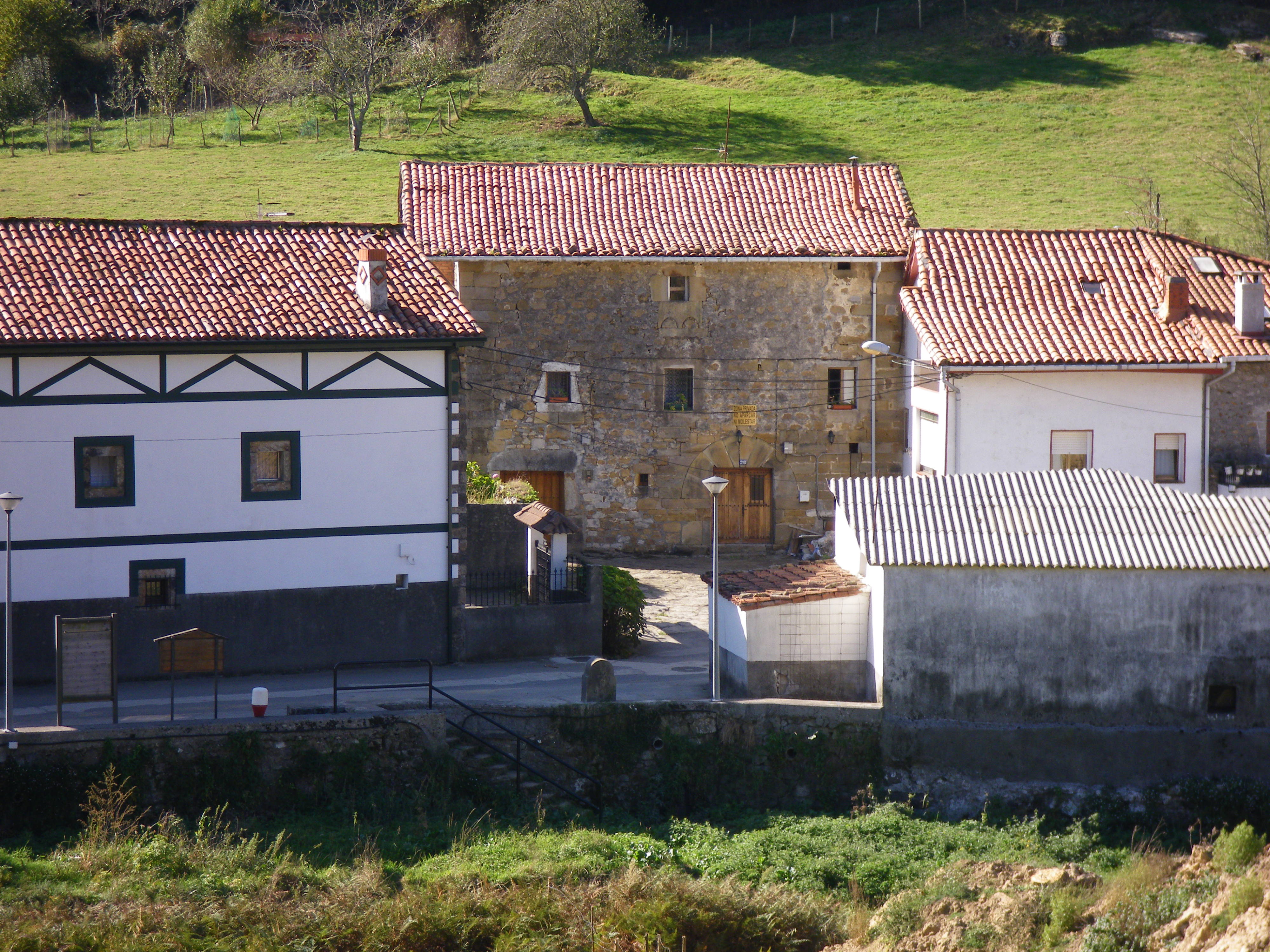 Basinagre dorretxea, Turtziozko udalerrian. Turtzioz, Enkarterri (Bizkaia).